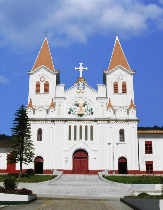 Iglesia de San José de la Montaña, Antioquia, Colombia.